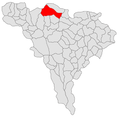 Categorie:Hărţi ale judeţului Alba